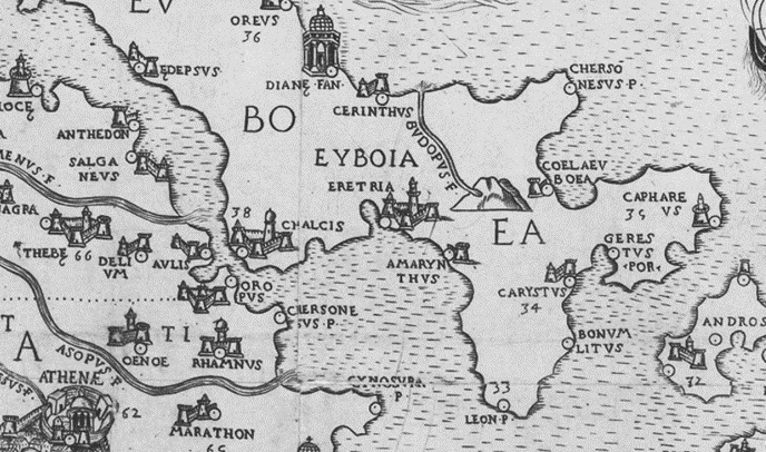 Τμήμα από χάρτη του 1552,όπου απεικονίζεται η νότια Εύβοια